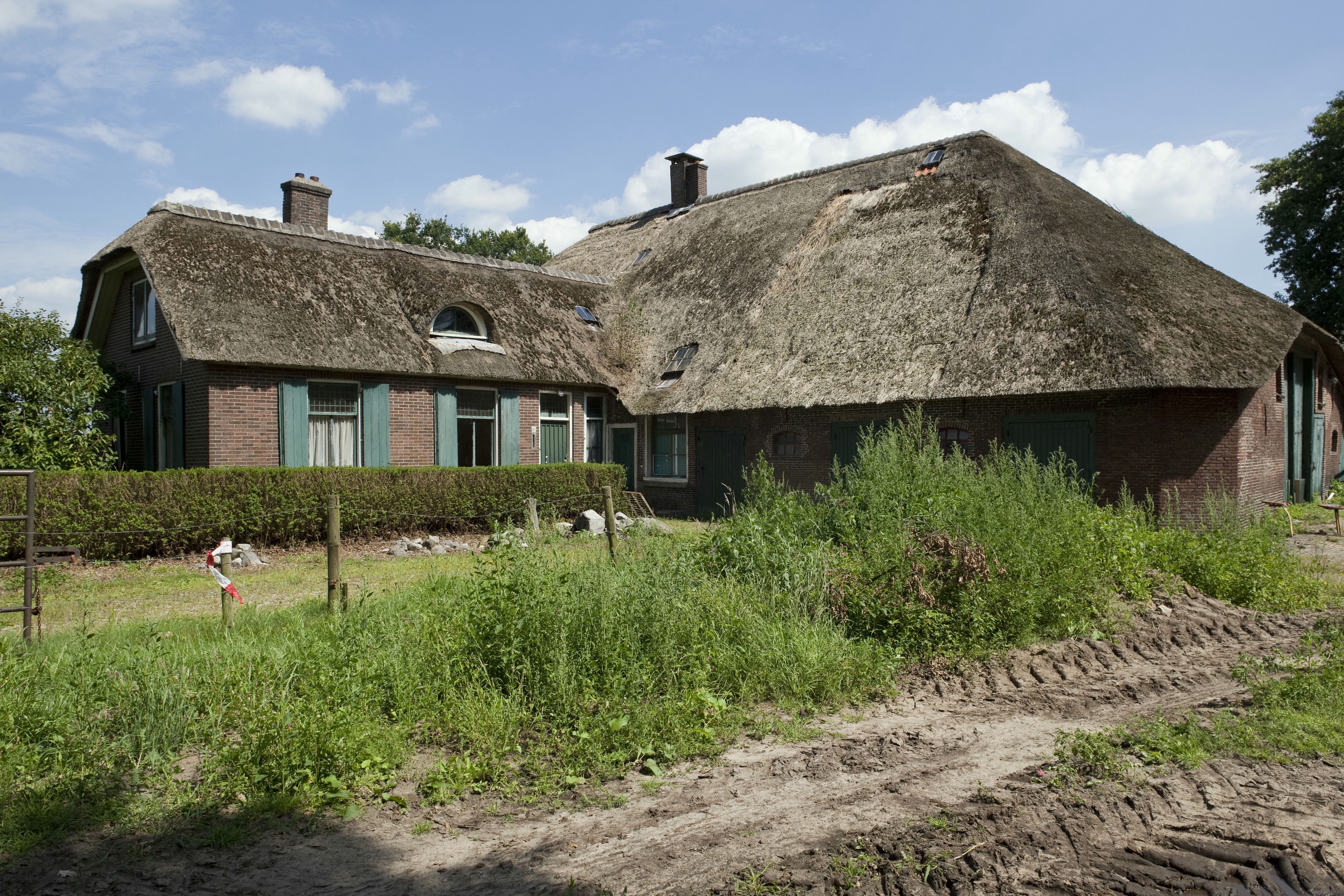 Boerderij Gagelgat: Overzicht zuidwest zijde van de boerderij - voorgevel van de latere aanbouw tegen de schuur